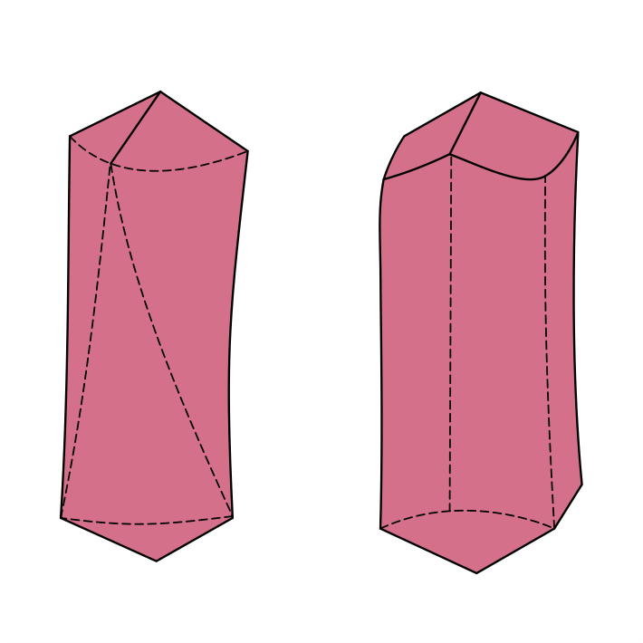 Sphärocobaltit aus Schneeberg, Sachsen, Deutschland, mit charakteristischen Scheinflächen in der Prismenzone. Eigene Zeichnung unter Zugrundelegung einer Vorlage aus Emil Fischer (1957): Neuere Untersuchungen über einige seltene sächsische Minerale. - Jahrbuch des Staatlichen Museums für Mineralogie und Geologie Dresden 1957, 238-241.